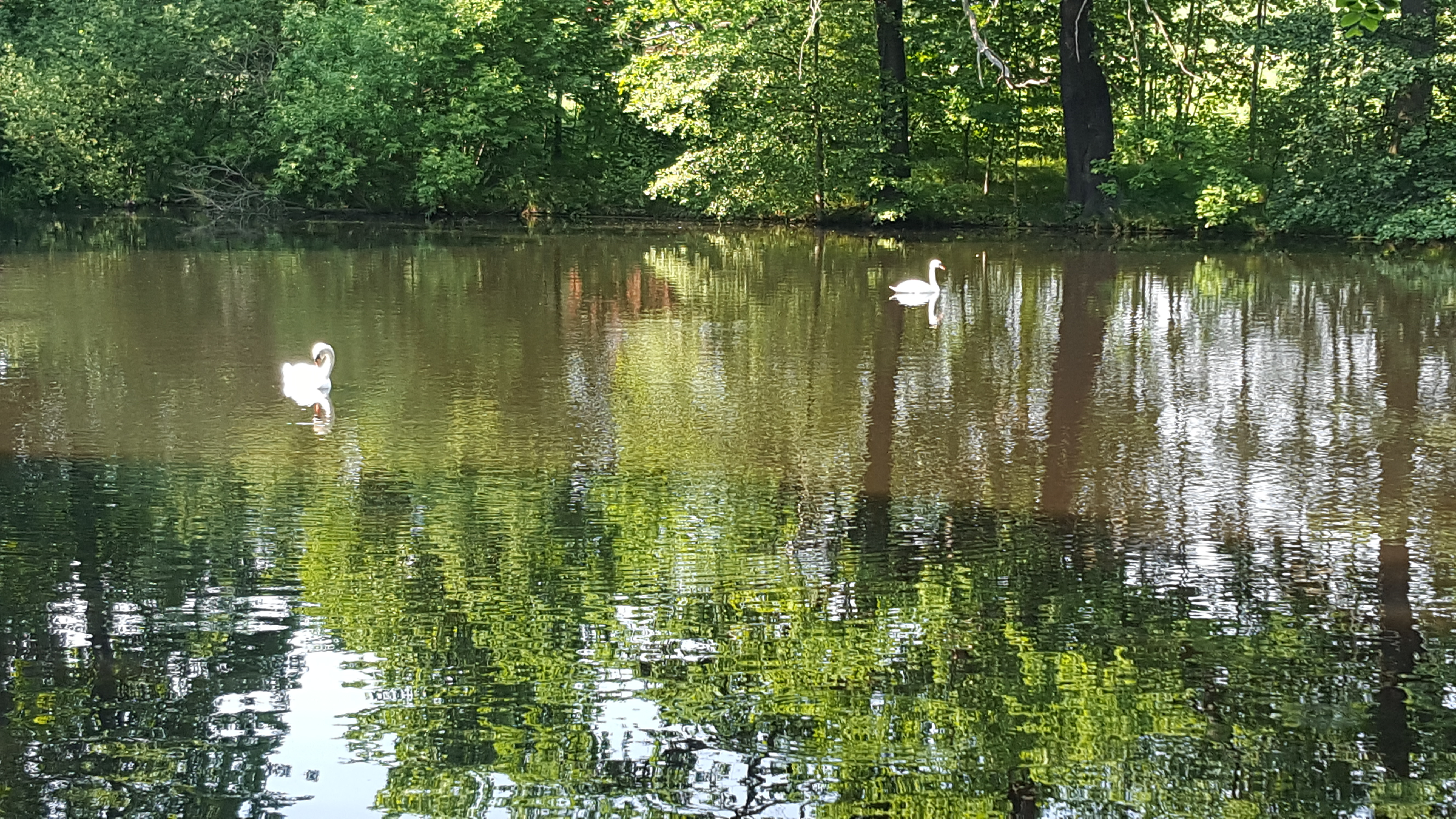 Hopfenbachtal. Schloßpark Naunhof. FHH-Gebiet: Hopfenbachtal, Gebietsnummer 4747-301. Landschaftsschutzgebiet.